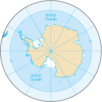 Južný oceán, slovenské popisky Source: sk modifikacia z en verzie Ocean.png Southern Ocean.png This work has been released into the public domain by its author, Julo. This applies worldwide.In some countries this may not be legally possible; if so:Julo grants anyone the right to use this work for any purpose, without any conditions, unless such conditions are required by law.